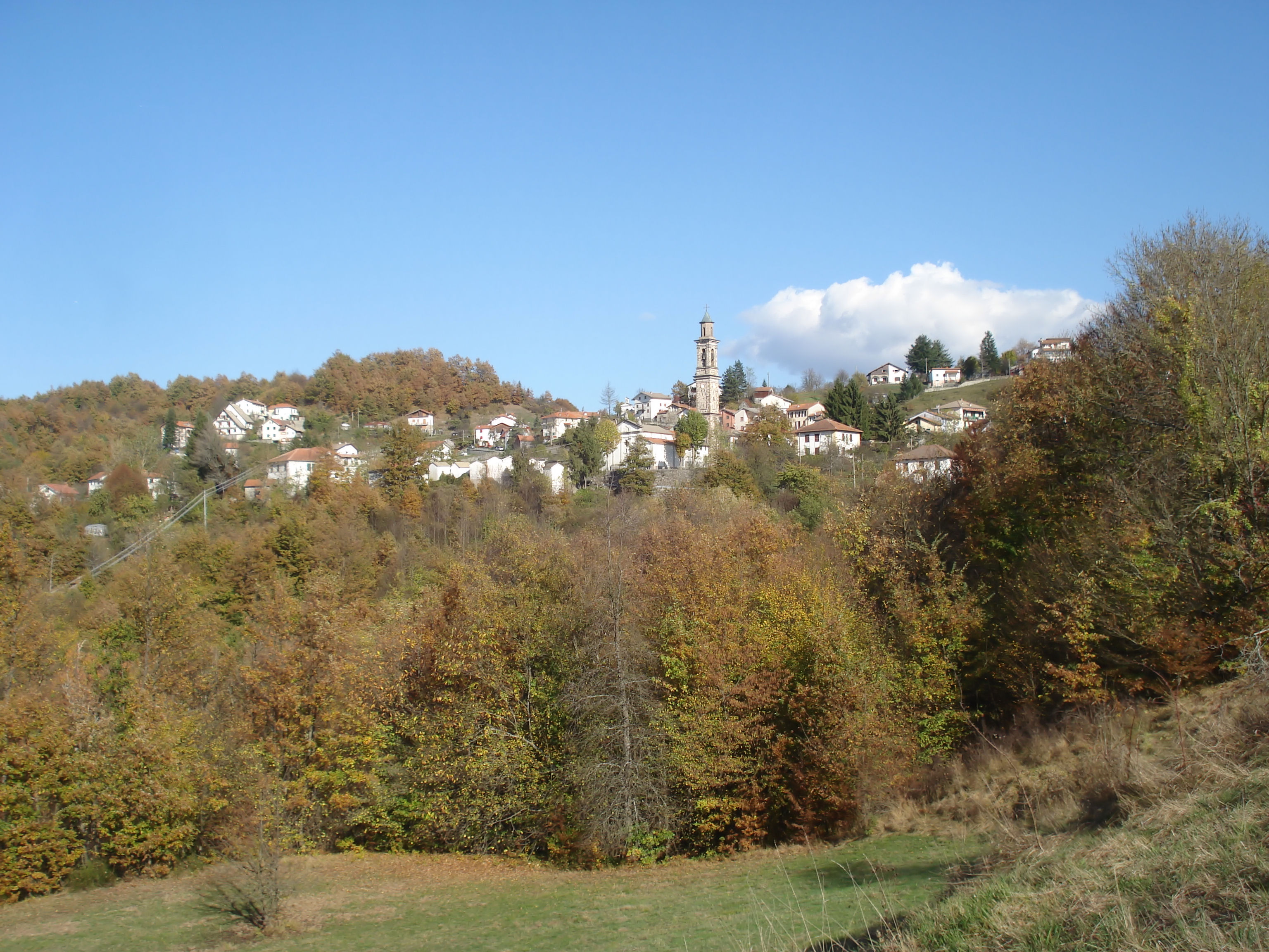 Cosmin latan,26/10/2008,Canale.